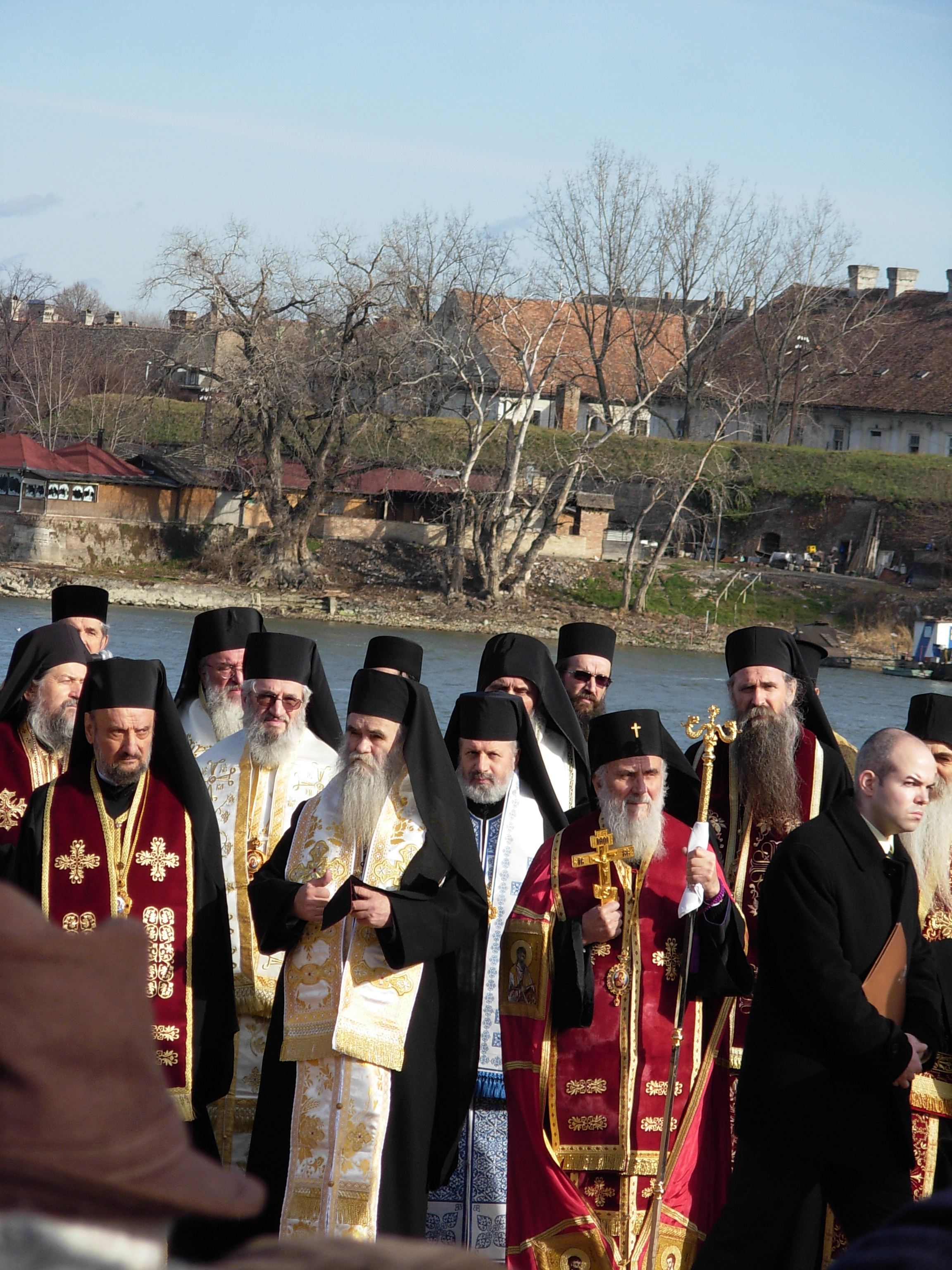 Predstavnici SPC na obeležavanju 70. godišnjice Novosadske racije.